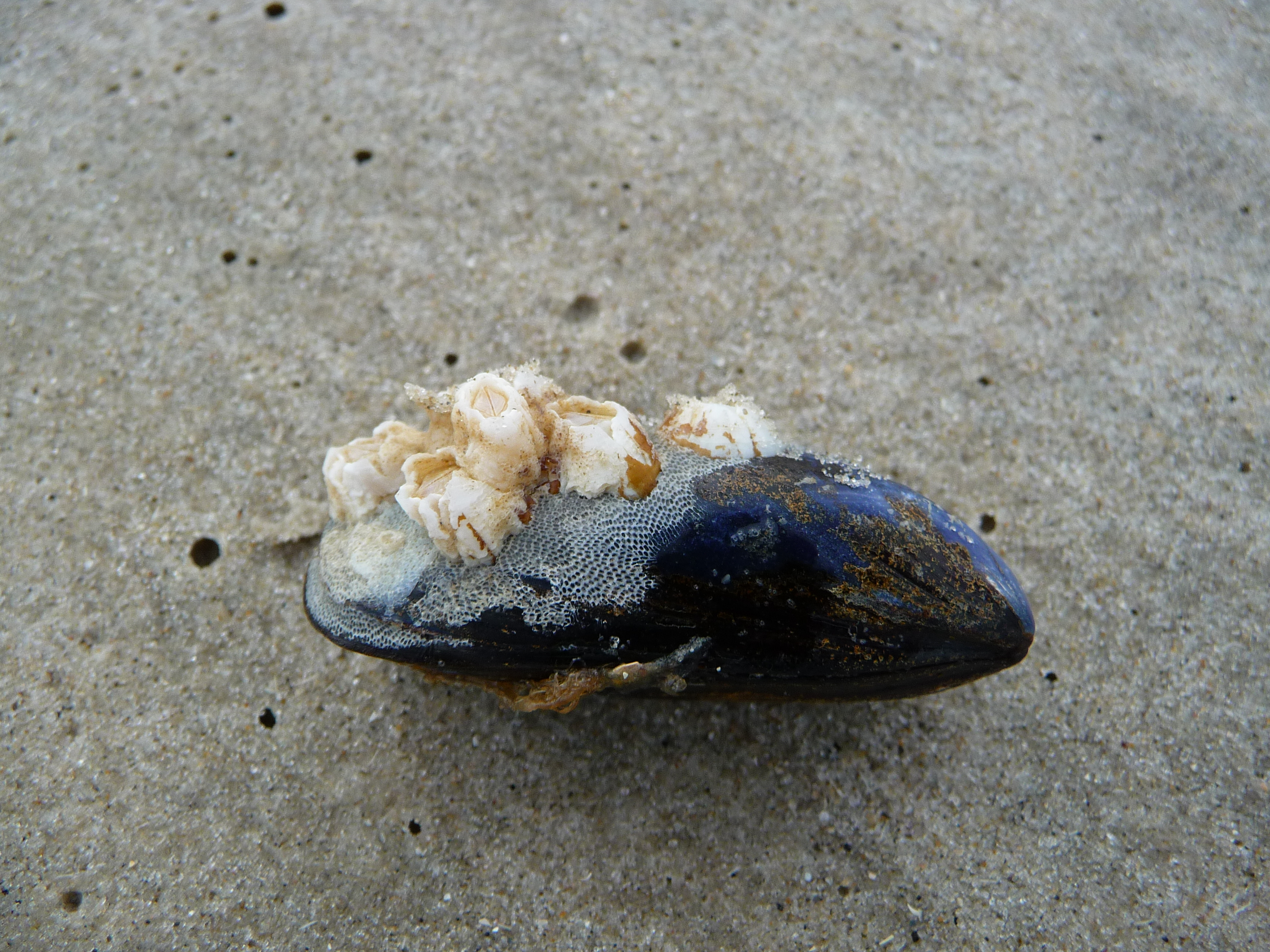 Geschlossene Miesmuschel (Mytilus) mit Seepocken (Balanidae), fotografiert am Strand der ostfriesischen Nordseeinsel Juist (Niedersachsen, Deutschland)